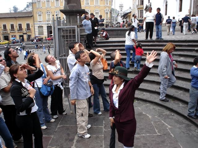 Rutas de Leyenda de Quito Eterno · La Torera en la Plaza de San Francisco · Archivo Quito Eterno / labriolle